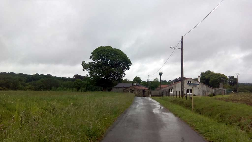 Vista de Portecelo, Curtis.